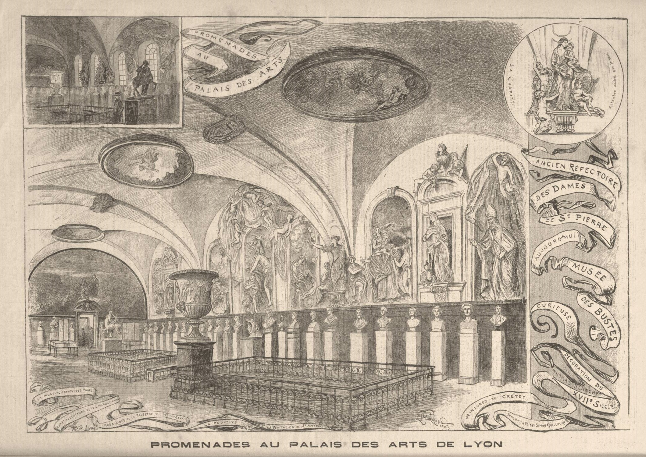 Dessin de Giranne dans la revue "Le Progrès illustré" du 15 février 1903 (page 8) représentant la qsalle des bustes du musée des beaux-arts de Lyon